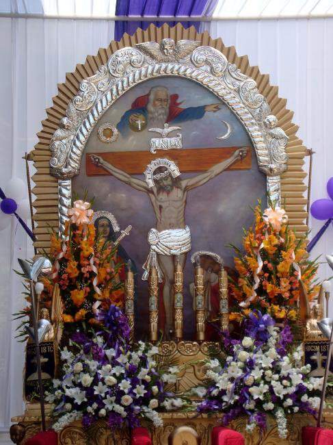 Imagen del Señor de los Milagros de la urbanizacion 18 de octubre, Huacho, Peru